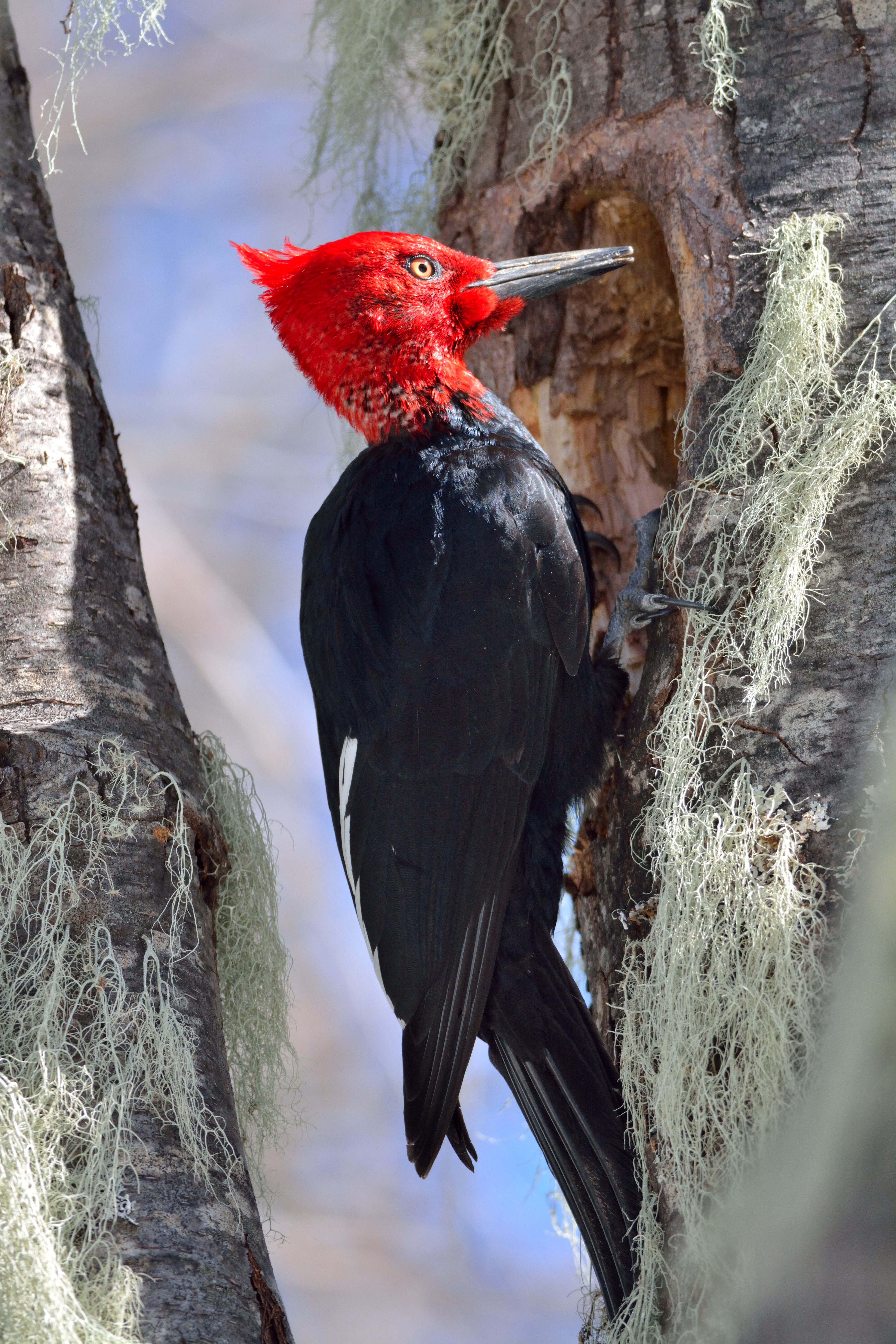 Carpintero Negro macho construyendo el nido.